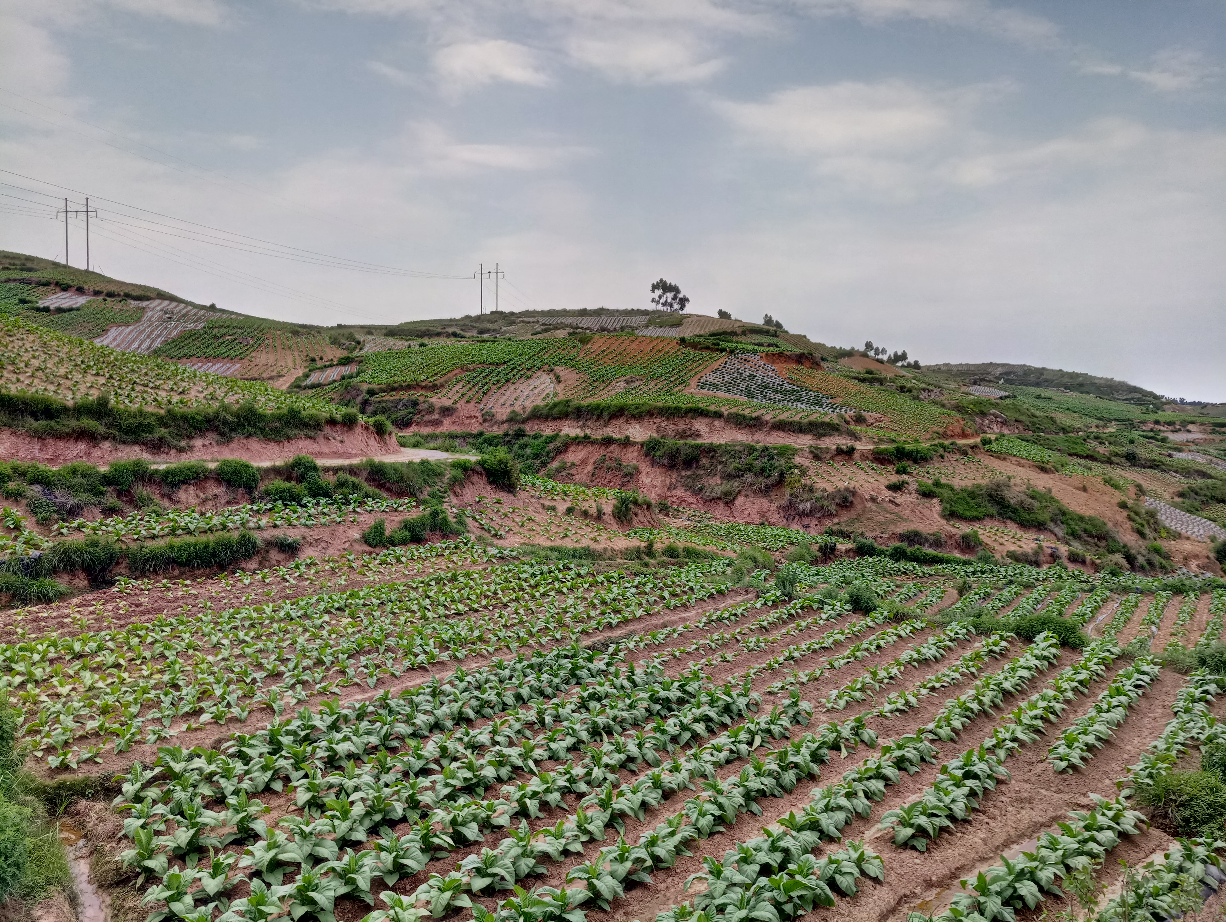 中文（中国大陆）: 石林县的农田，种植着烤烟